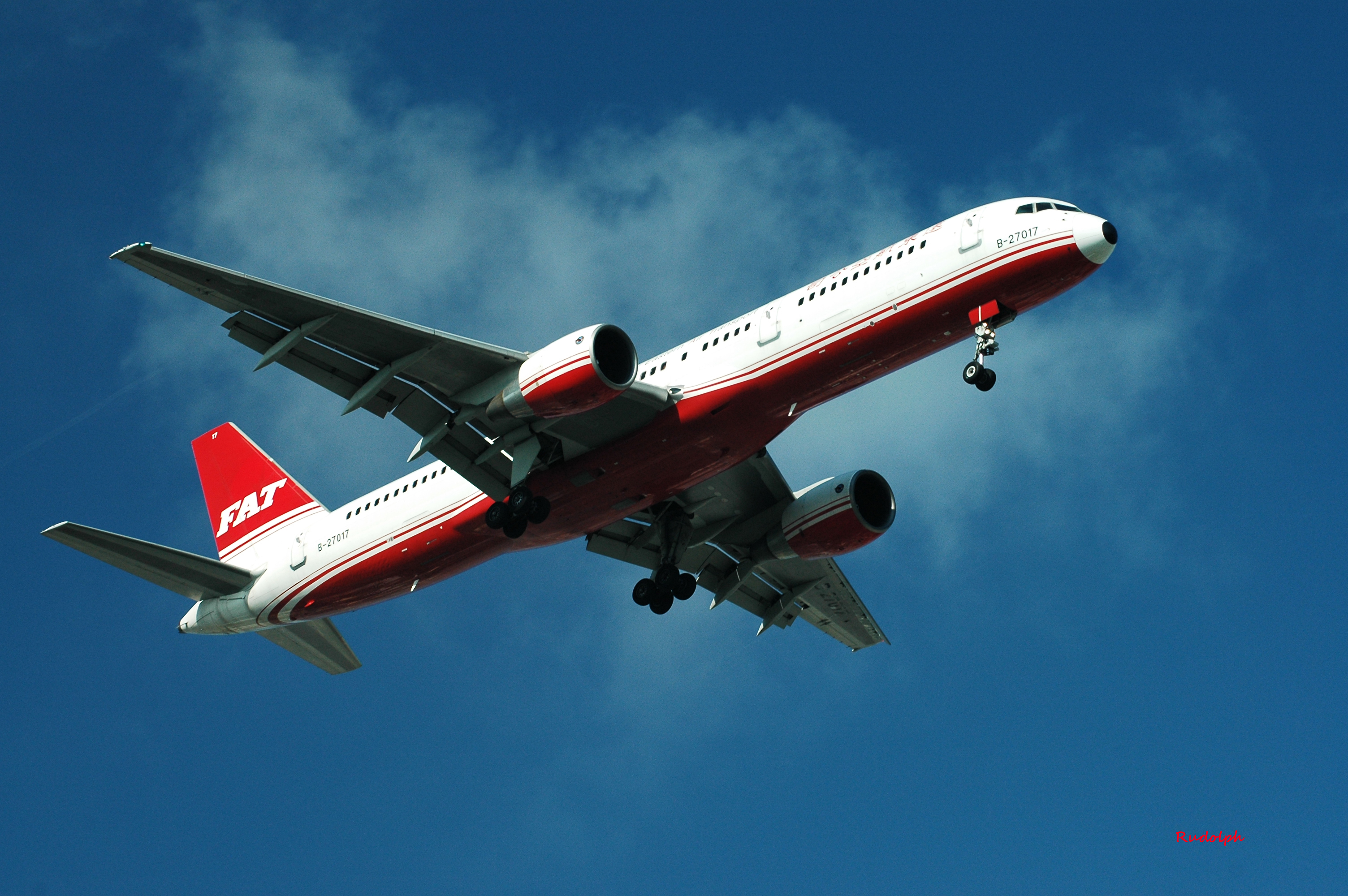 遠東航空已退役之波音757-200，機號B-27017，攝於2006年4月11日。